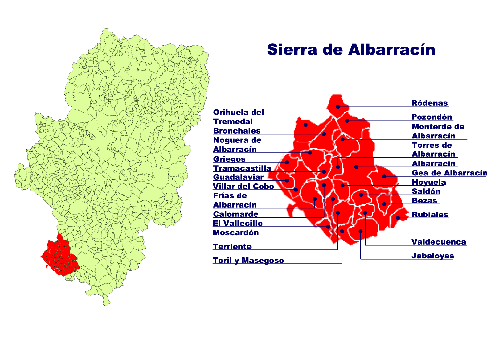 Comarca de la Sierra de Albarracín Creado el 10.11.2005 por Ecelan en base a Image:Aragon municipalities.png